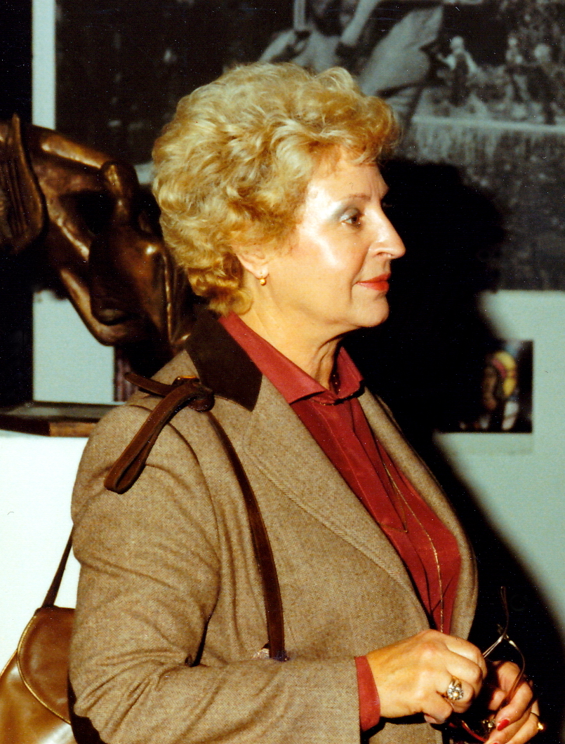 Portrait der Bildhauerin Margarete Wiggen